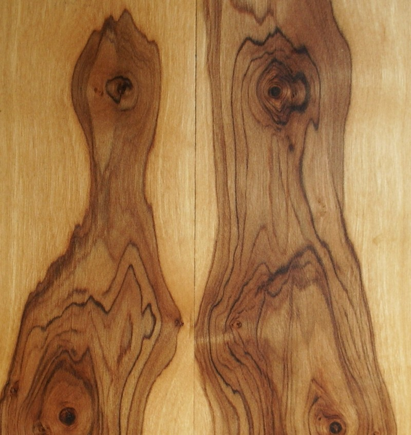 Brettchen aus Olivenholz, imprägniert mit Olivenöl, eigenes Werkstück